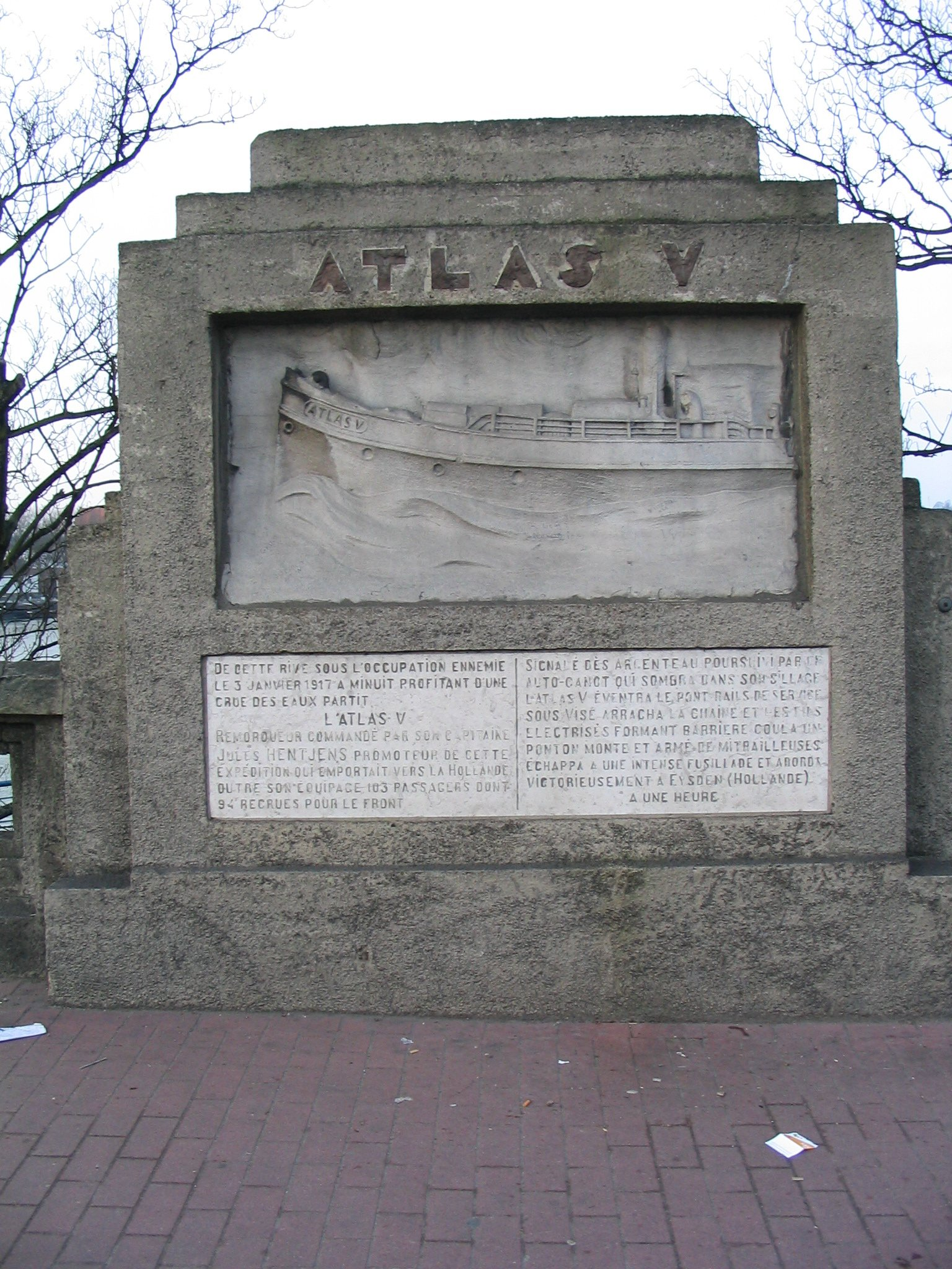 Monument sur le Pont Atlas V (mémorial expliquant le nom du pont)